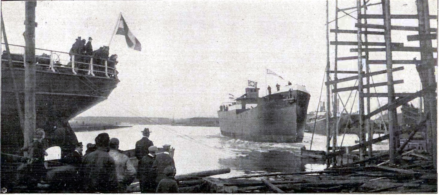 Stapellauf der Anneliese in Lübeck am 4. April 1908 auf der Schiffwerft von Henry Koch.